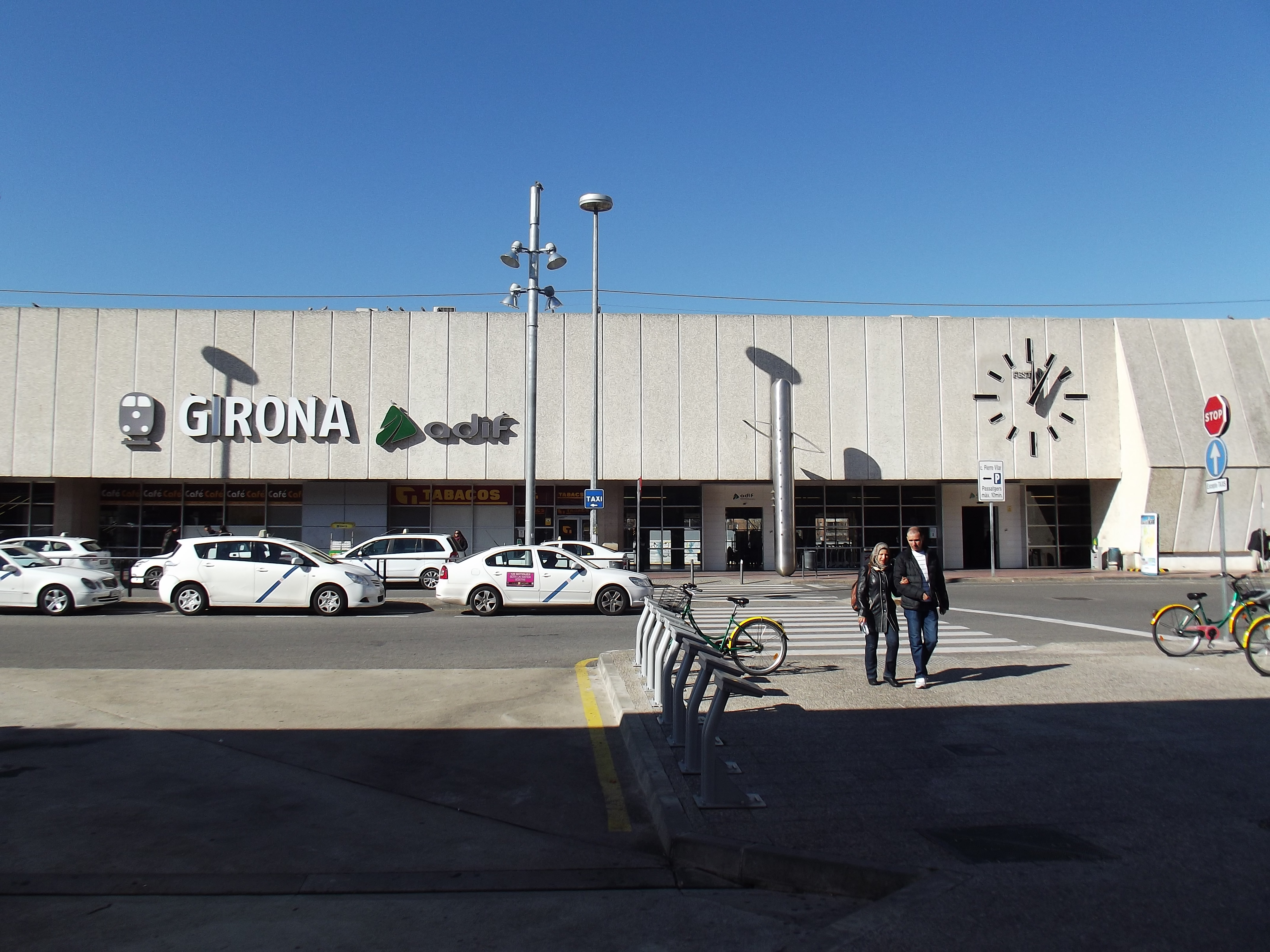 Stationsingang aan stadszijde